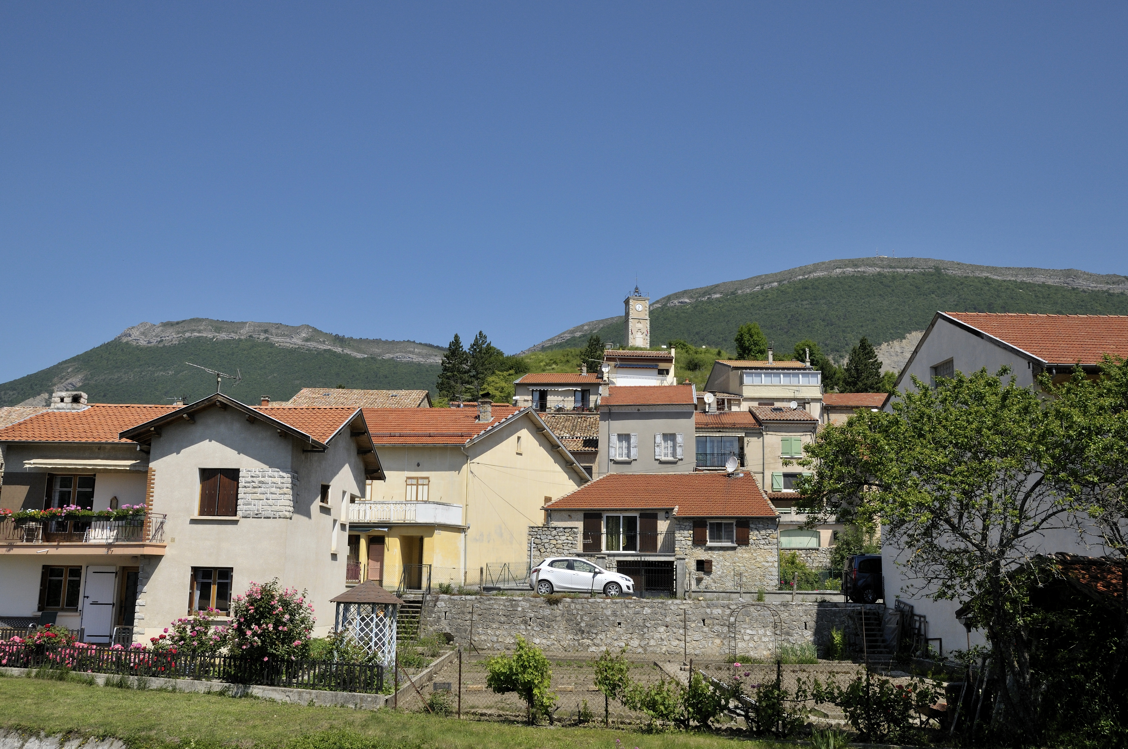 la tour dominant le village